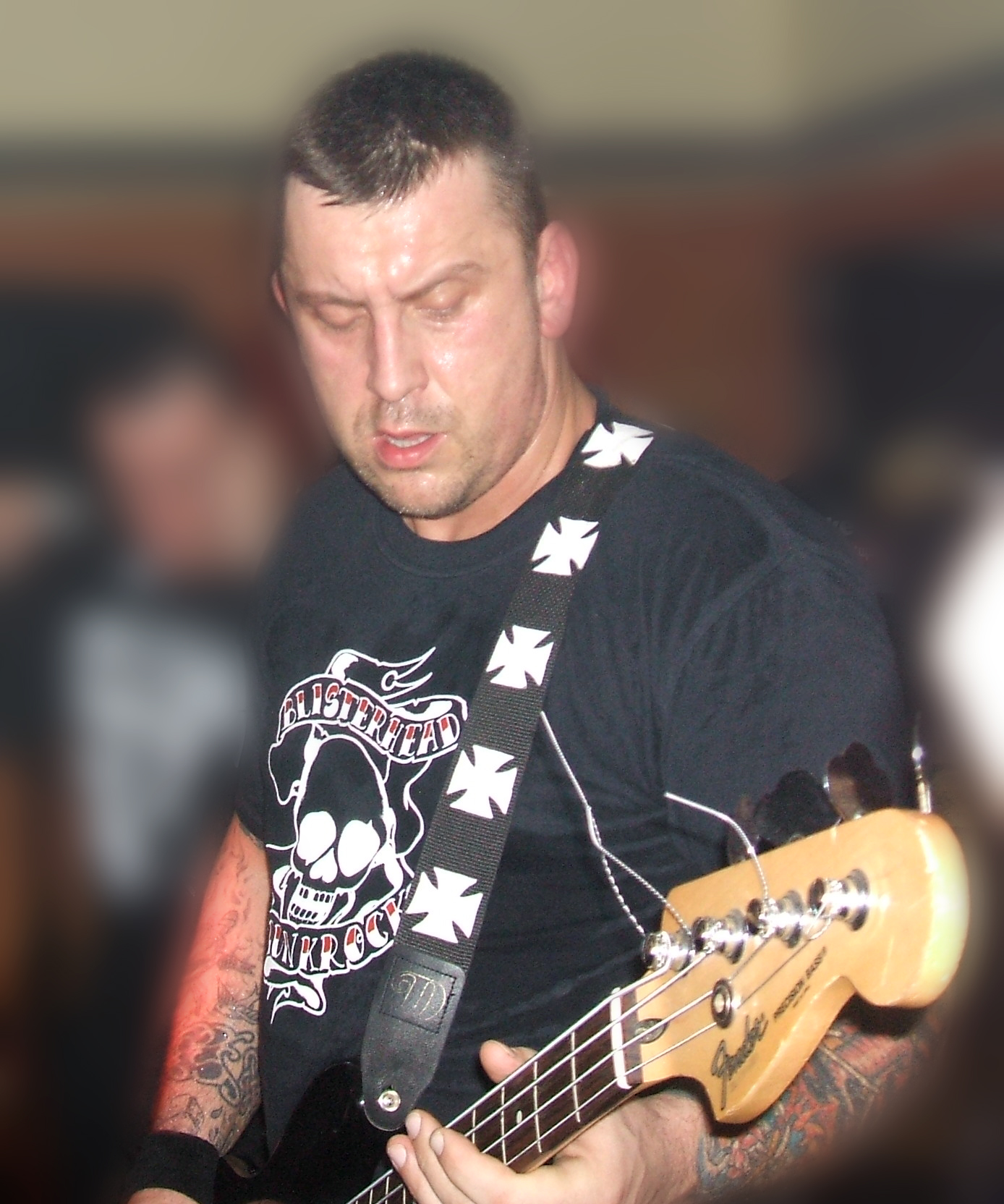 Paweł Czekała of The Analogs